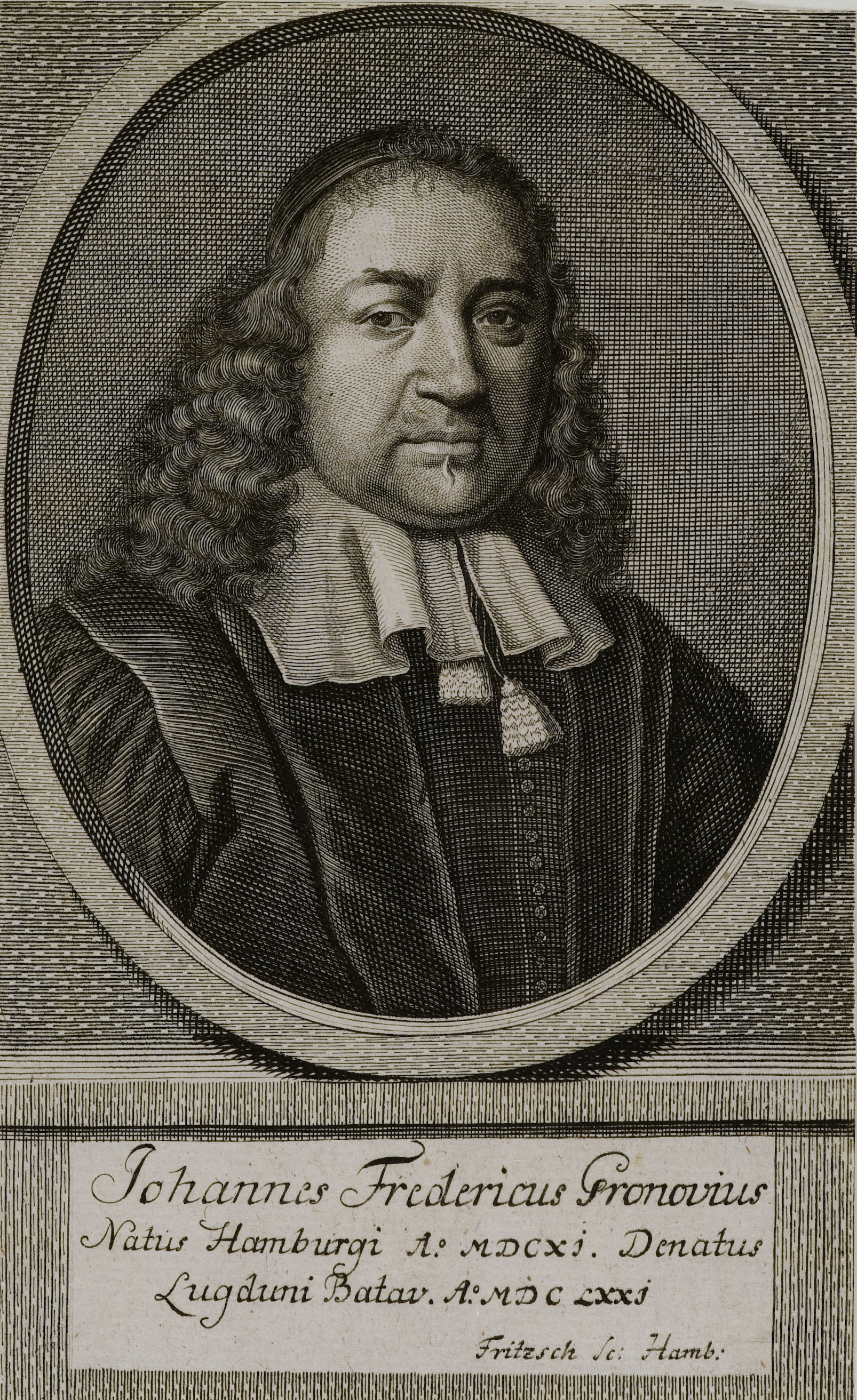 Johannes Fredericus Gronovius